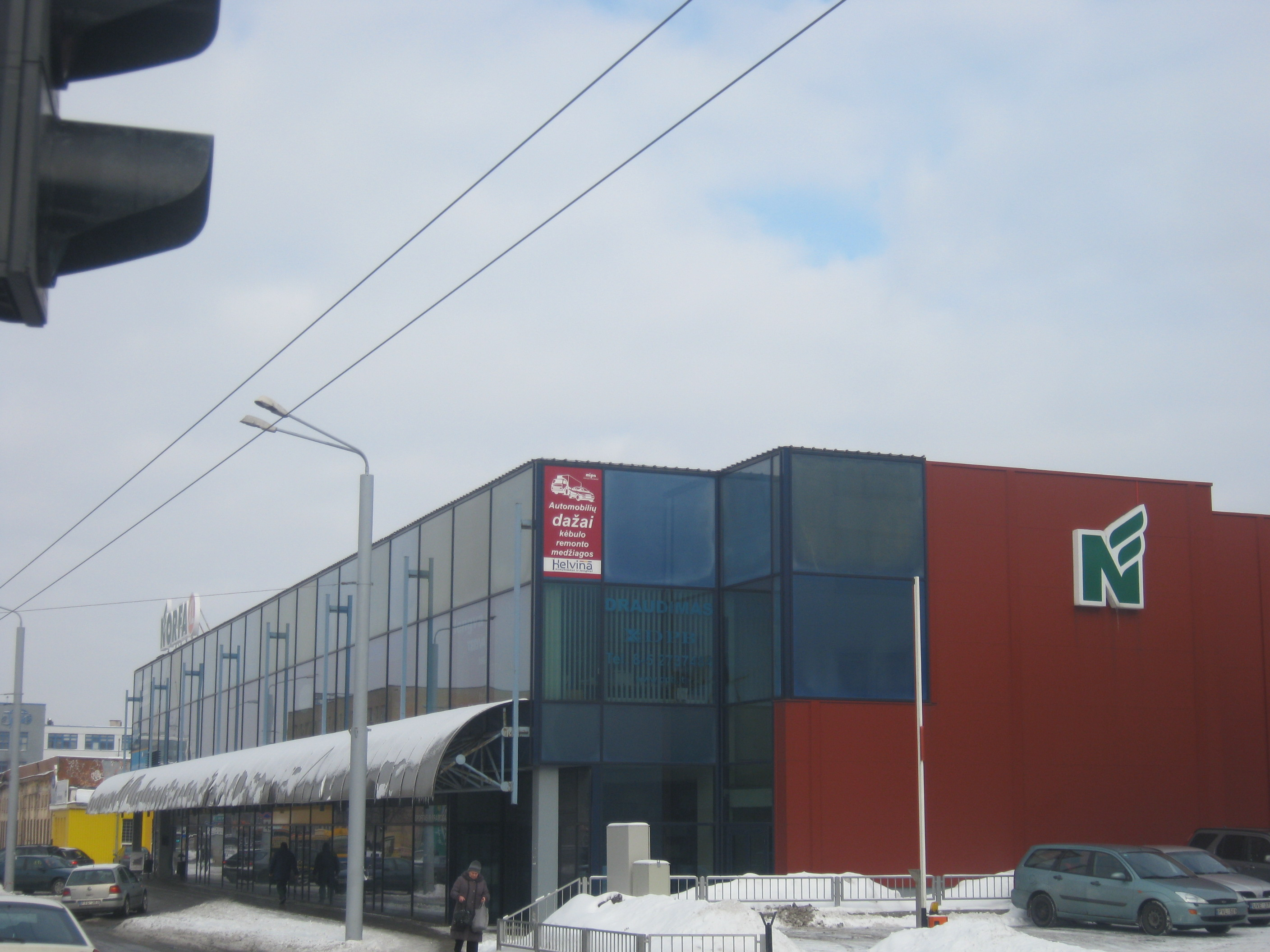 Norfa XL, Švitigailos g. 40a, Vilnius